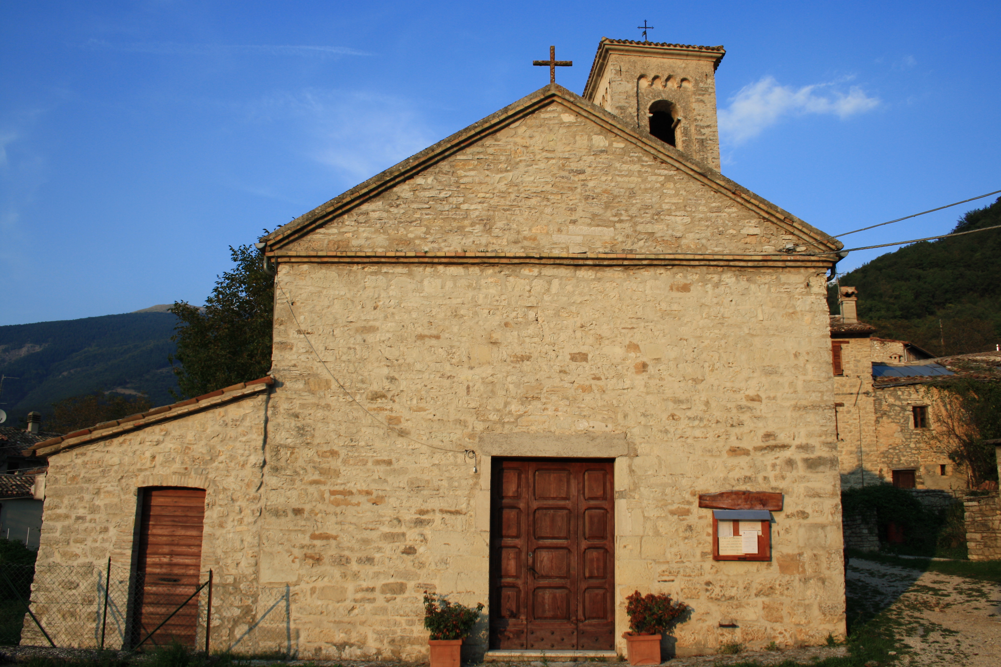 Vista della chiesa di San Martino